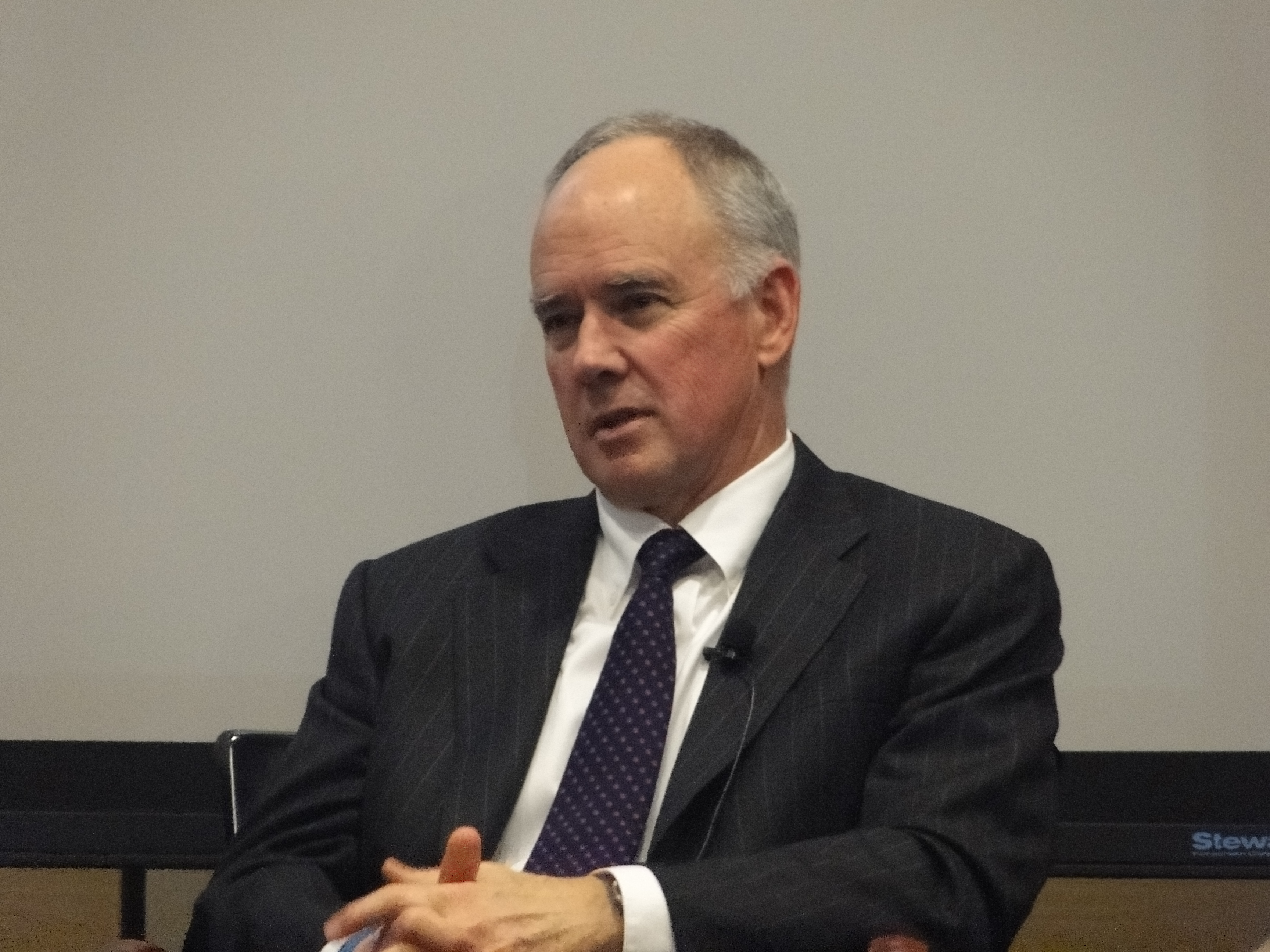 Sandy Alderson